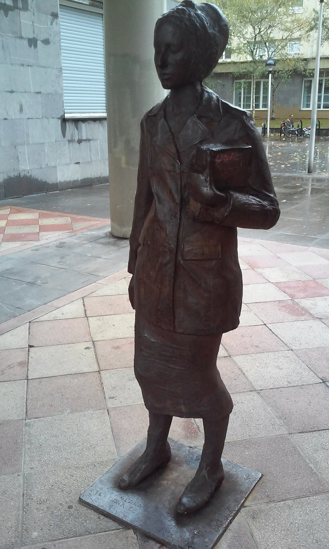 Clara Campoamor-i omenezko eskultura Benta Berrin